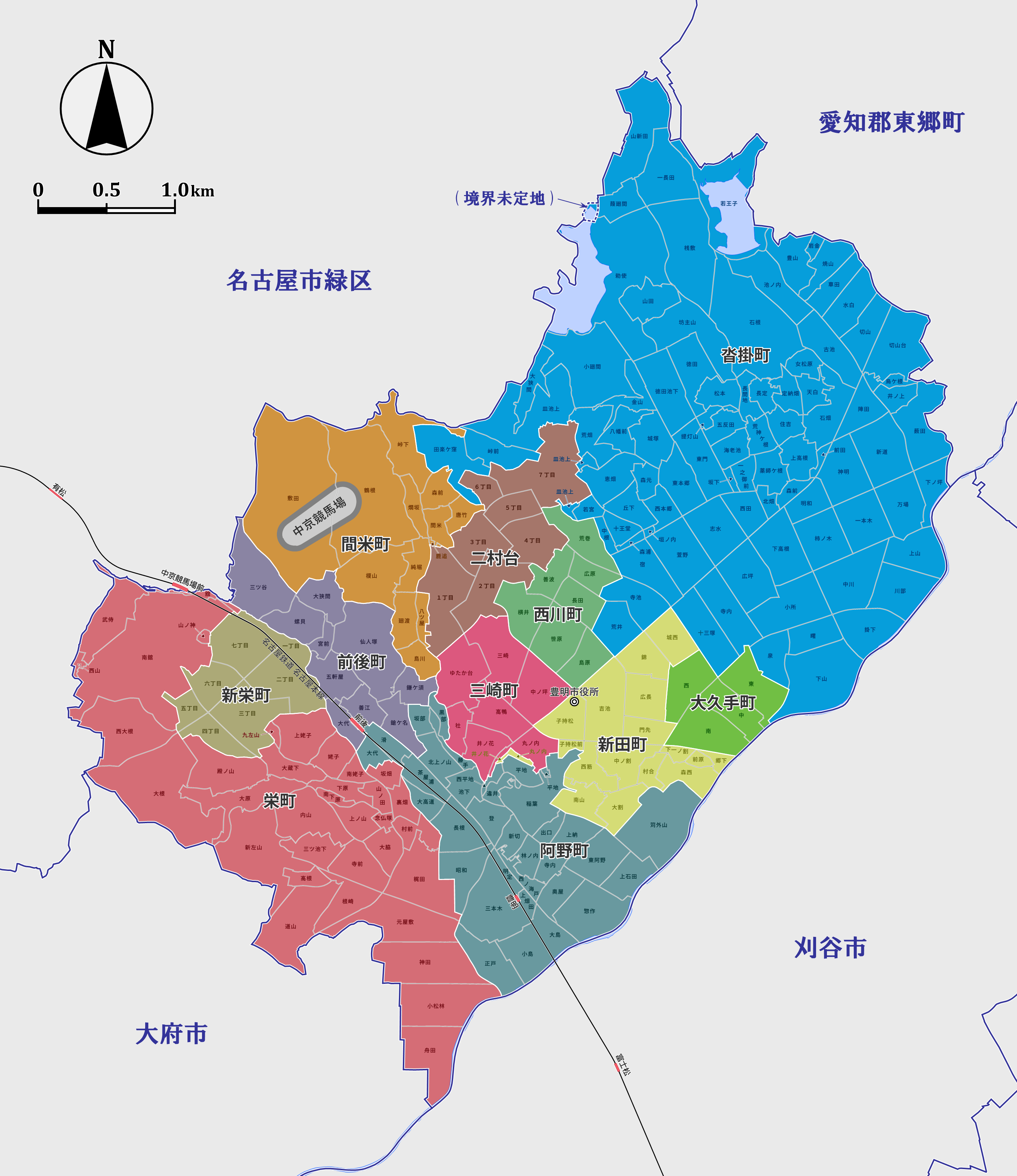 豊明市町字図（2018年（平成30年）5月現在）